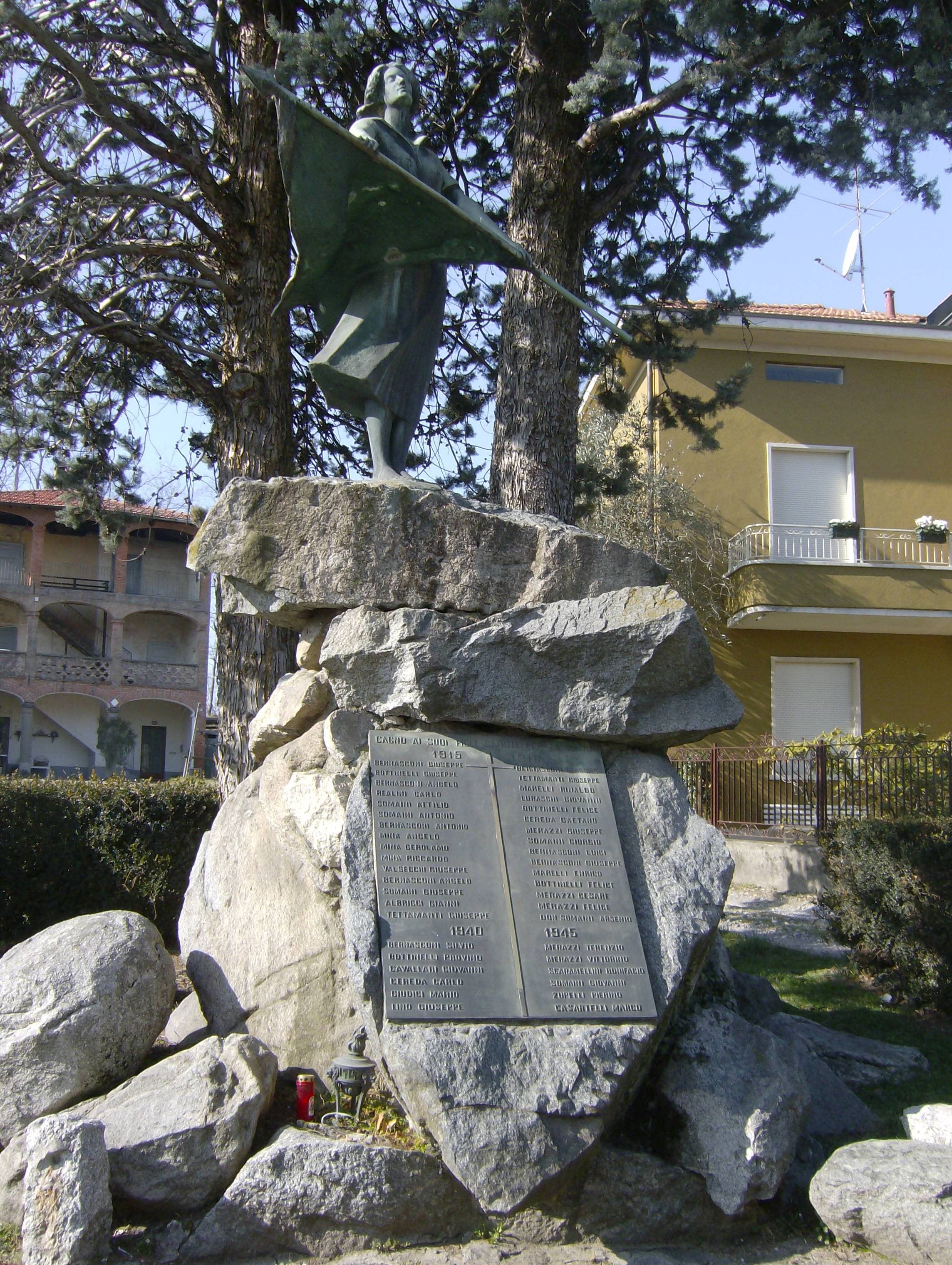 Monumento ai caduti